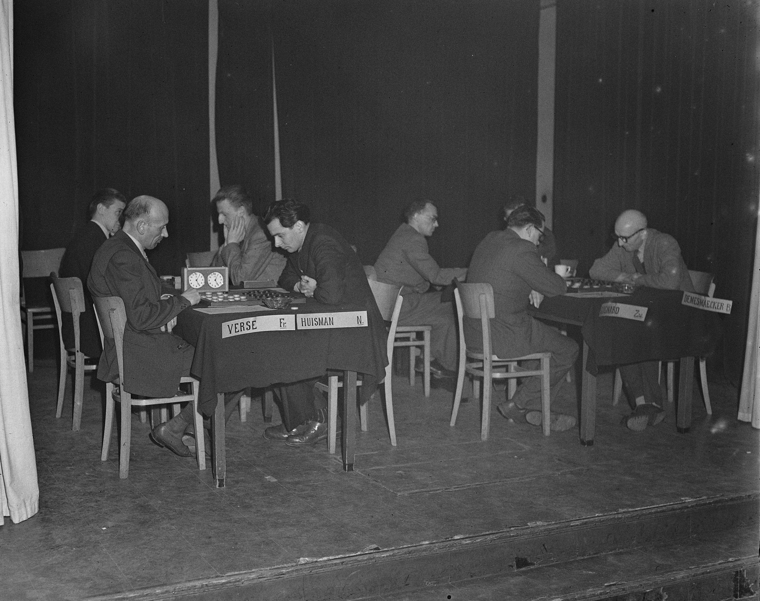 Collectie / Archief : Fotocollectie Anefo Reportage / Serie : [ onbekend ] Beschrijving : Kandidatentoernooi dammen Leiden. Overzichten. Links: Abel Verse - Wim Huisman. Rechts: ....gnard (Zwitserland) - Joseph Demesmaecker Datum : 13 februari 1954 Locatie : Leiden, Zuid-Holland Trefwoorden : dammen Fotograaf : Rossem, Wim van / Anefo Auteursrechthebbende : Nationaal Archief Materiaalsoort : Glasnegatief Nummer archiefinventaris : bekijk toegang 2.24.01.09 Bestanddeelnummer : 906-2968